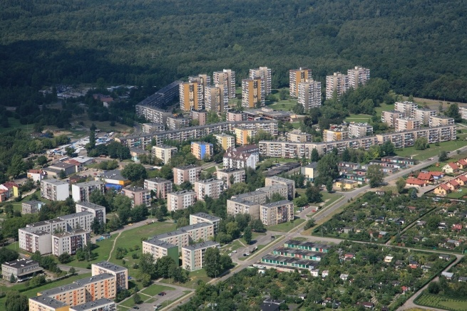 Bytom z lotu ptaka - Miechowice.